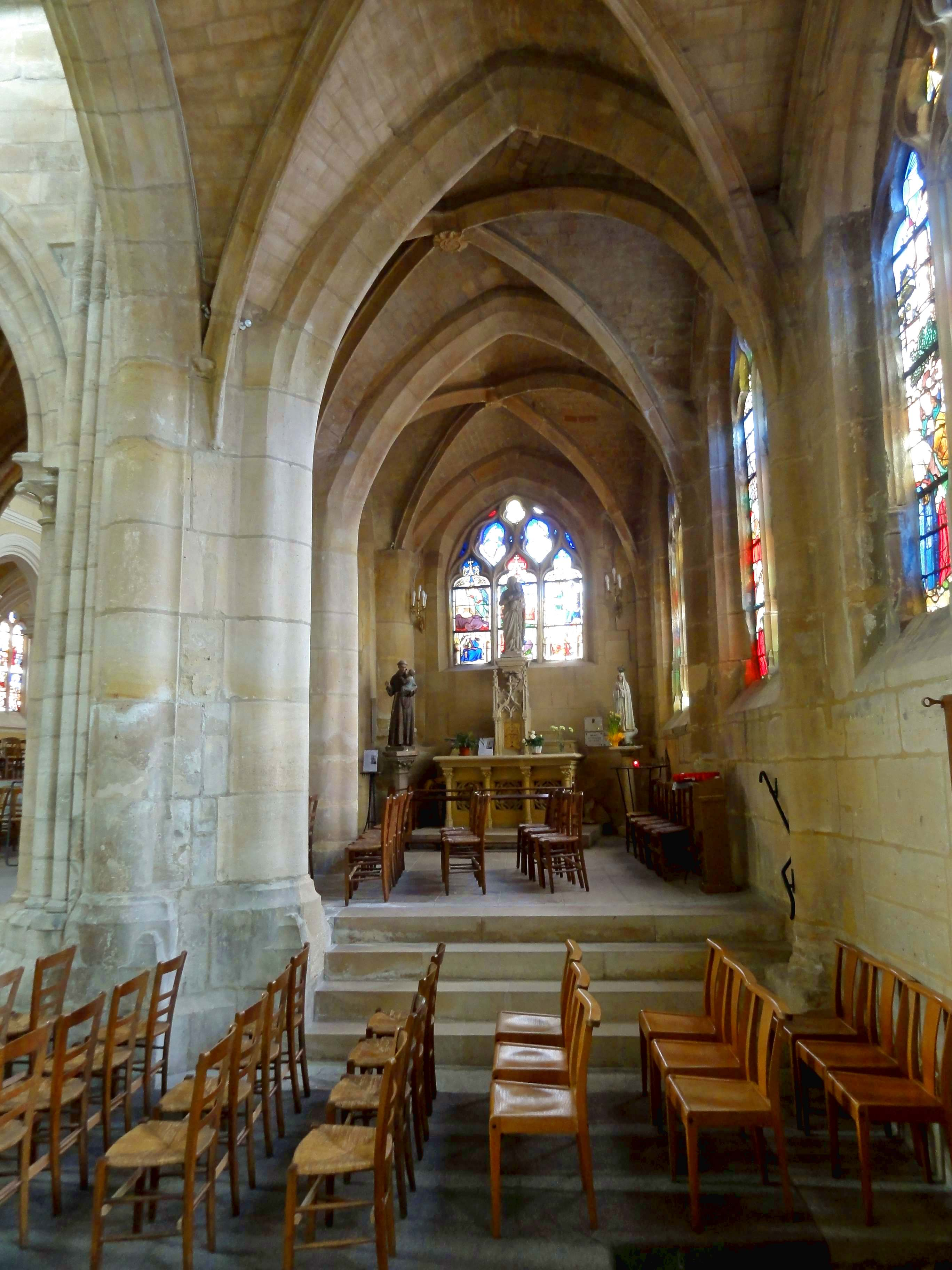 Intérieur de l'église - voir titre.